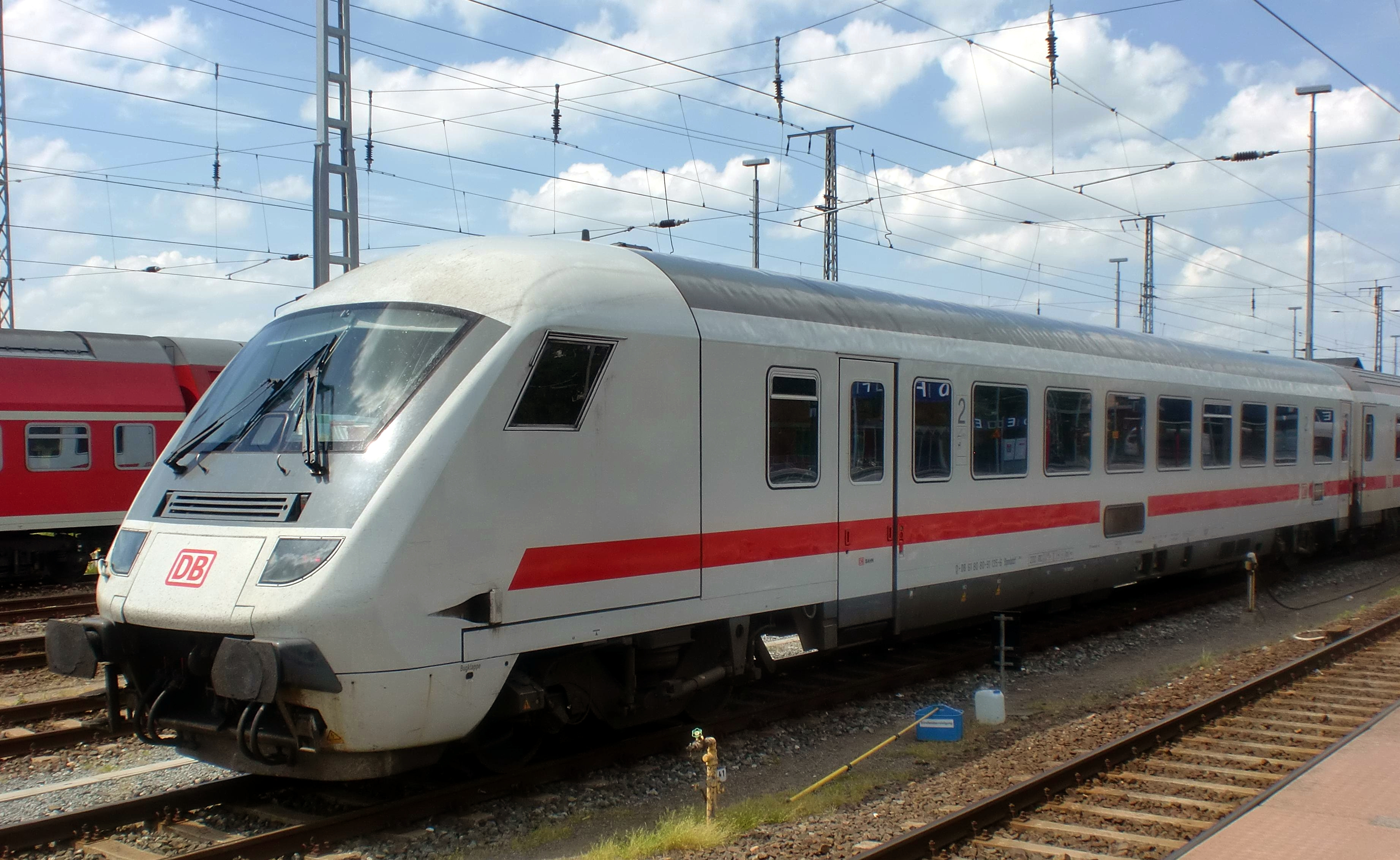 Bpmbdzf 296.1 (D-DB 61 80 80-91 135-6) in Stralsund Hbf